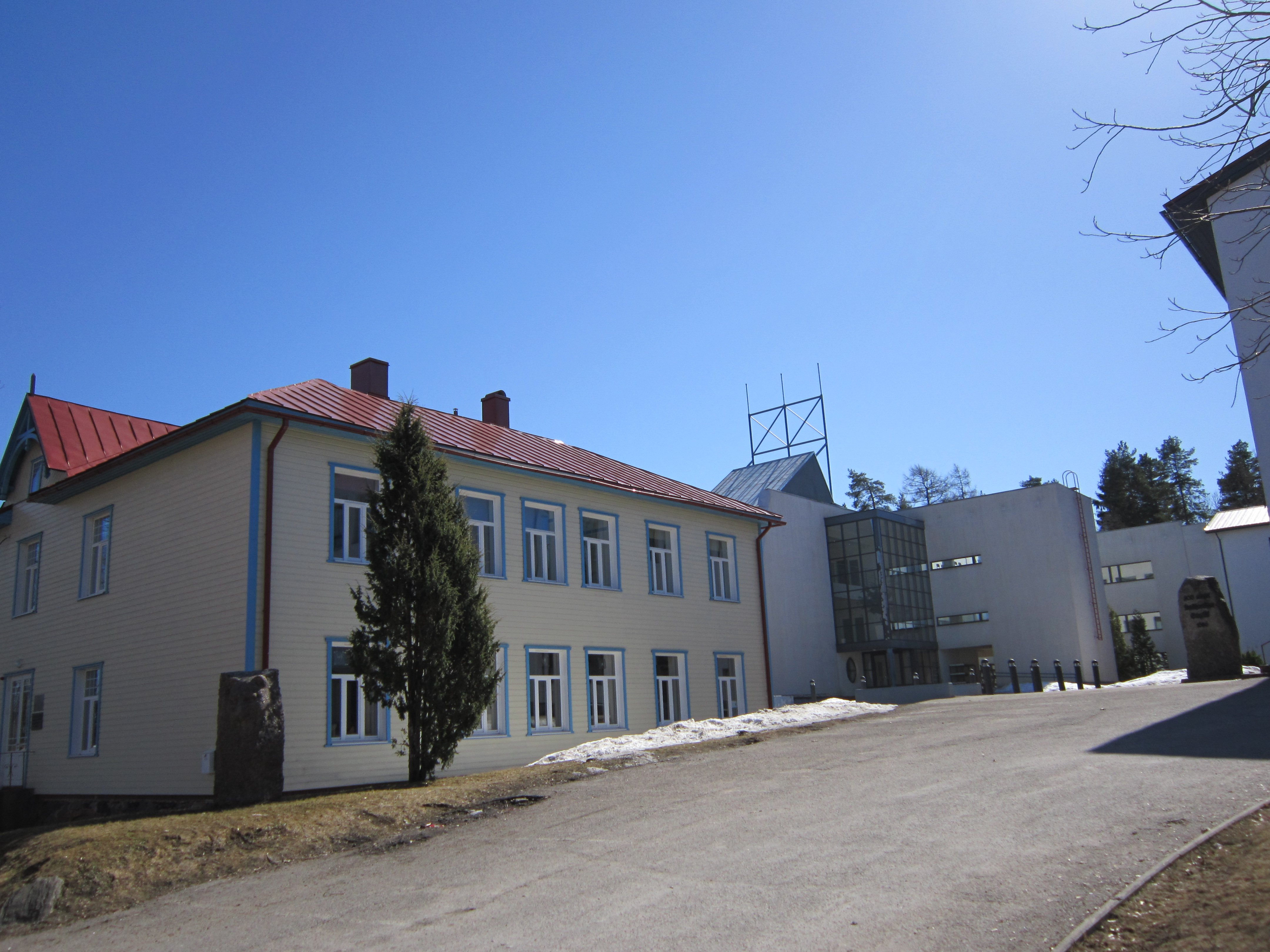 1909. aastal ehitatud Nuustaku Progümnaasiumi hoone, milles pärast renoveerimist asuvad muusikakool, muuseum ja kunstikodu.